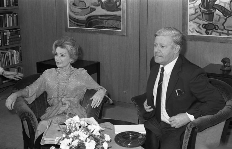 Fernsehinterview des Bundeskanzlers mit Lilli Palmer